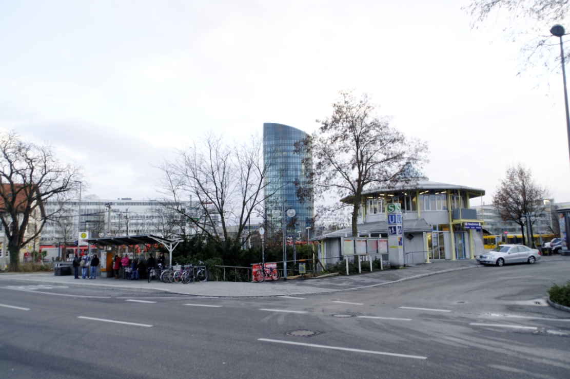 Gebiet Stuttgart-Vaihingen